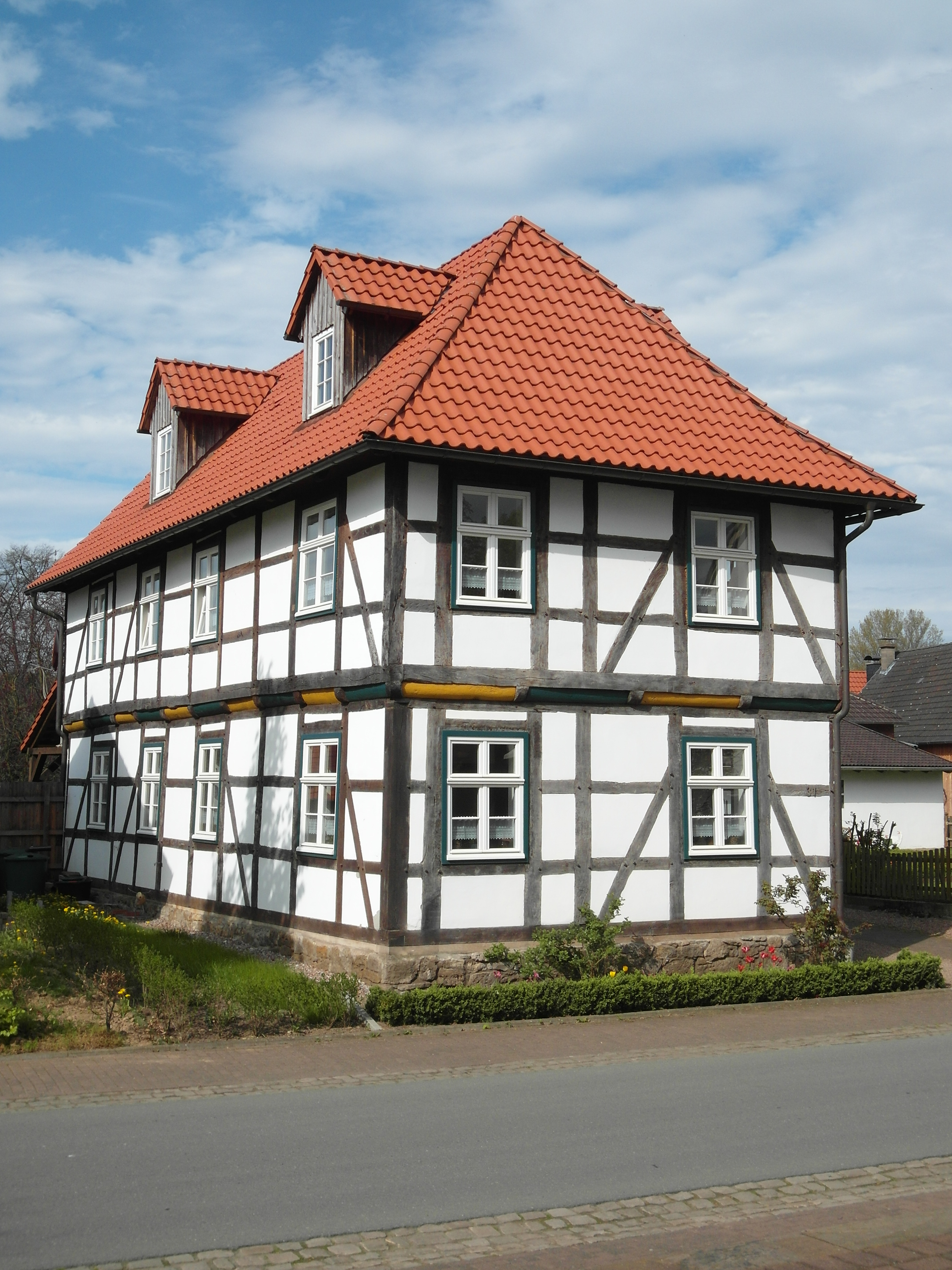 Dieses Foto zeigt die ehemalige Vikarie in Bökendorf (Brakel). This is a photograph of an architectural monument.